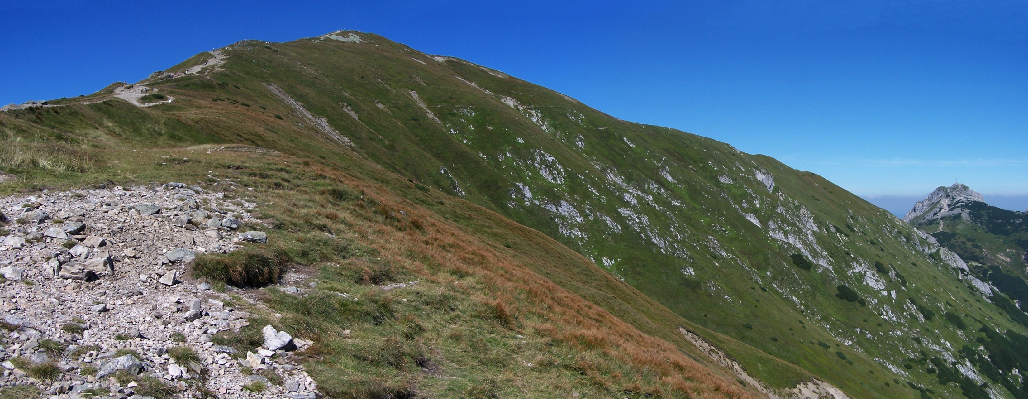 Kopa Kondracka, widok z Przełęczy pod Kopą Kondracka. widoczny upłaz Wielkie Szerokie